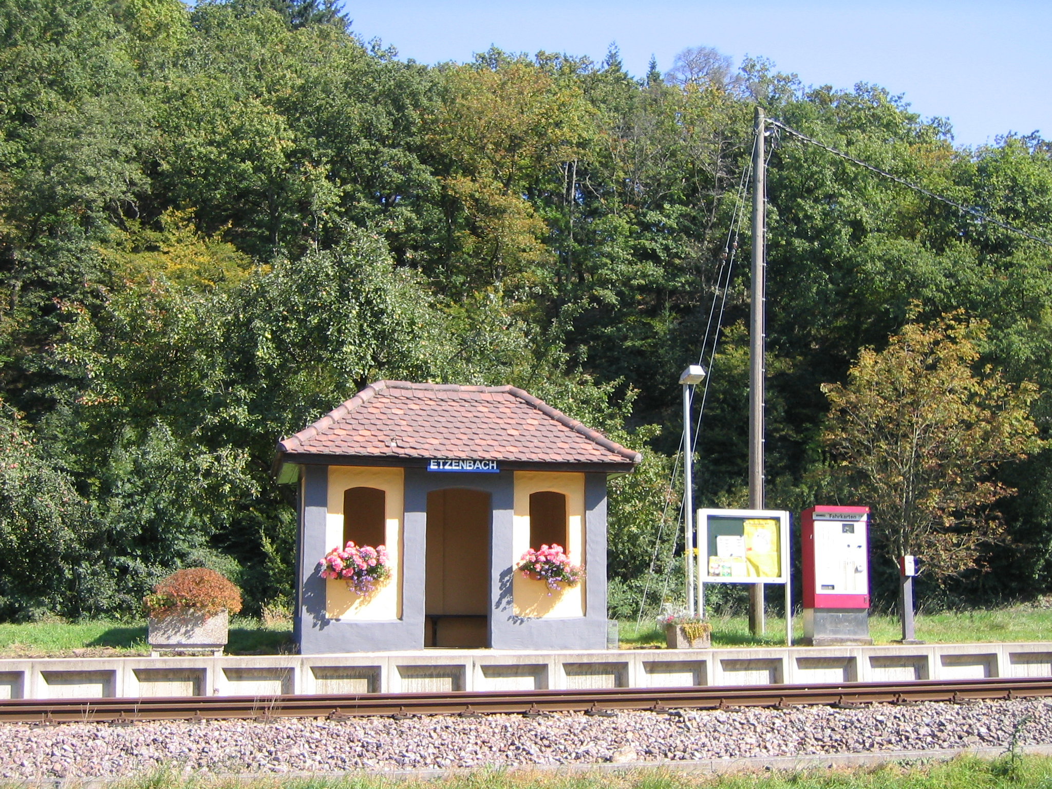 Eisenbahnhaltepunkt Etzenbach bei Staufen im Breisgau